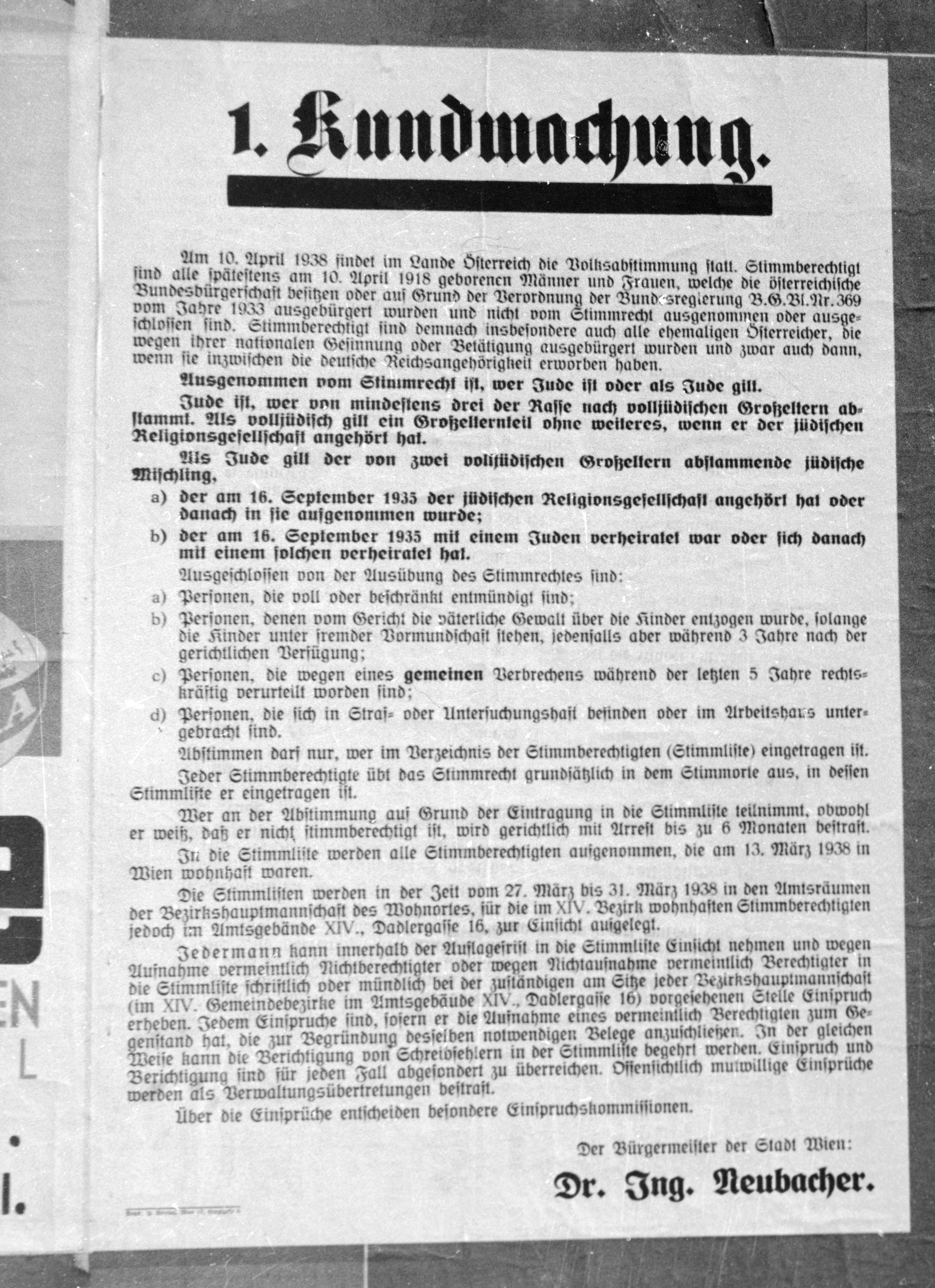 Österreich, Wien: Plakat; Plakat zur Volksabstimmung am 10. April (1. Kundmachung)